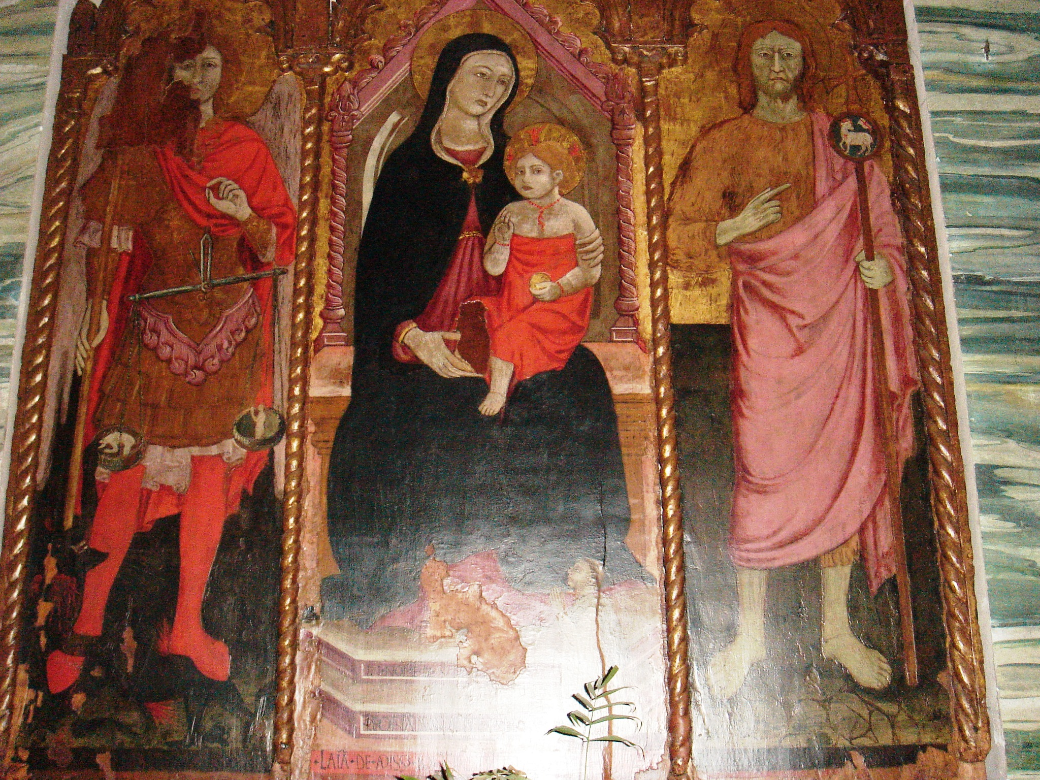 Roma, Santa Barbara dei Librai: Madonna con san Giovanni evangelista e san Michele Arcangelo